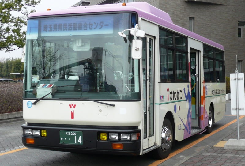 埼玉県県民活動総合センターのシャトルバス。